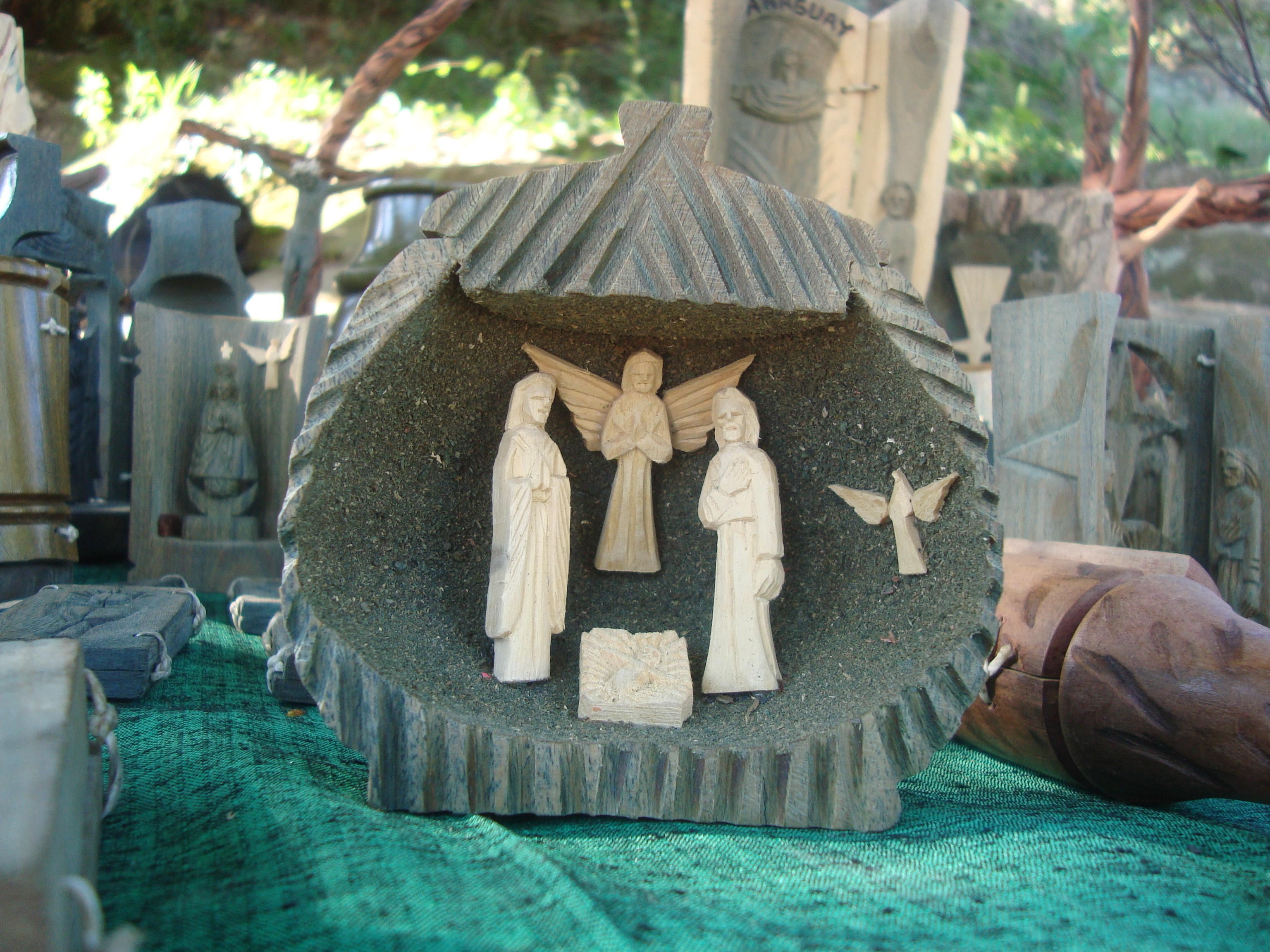 Pesebre por un artesano de Tobati (Paraguay). La madera verde es palo santo (Bulnesia sarmientoi) y la blanca guatambu (Balfourodendron riedelianum).